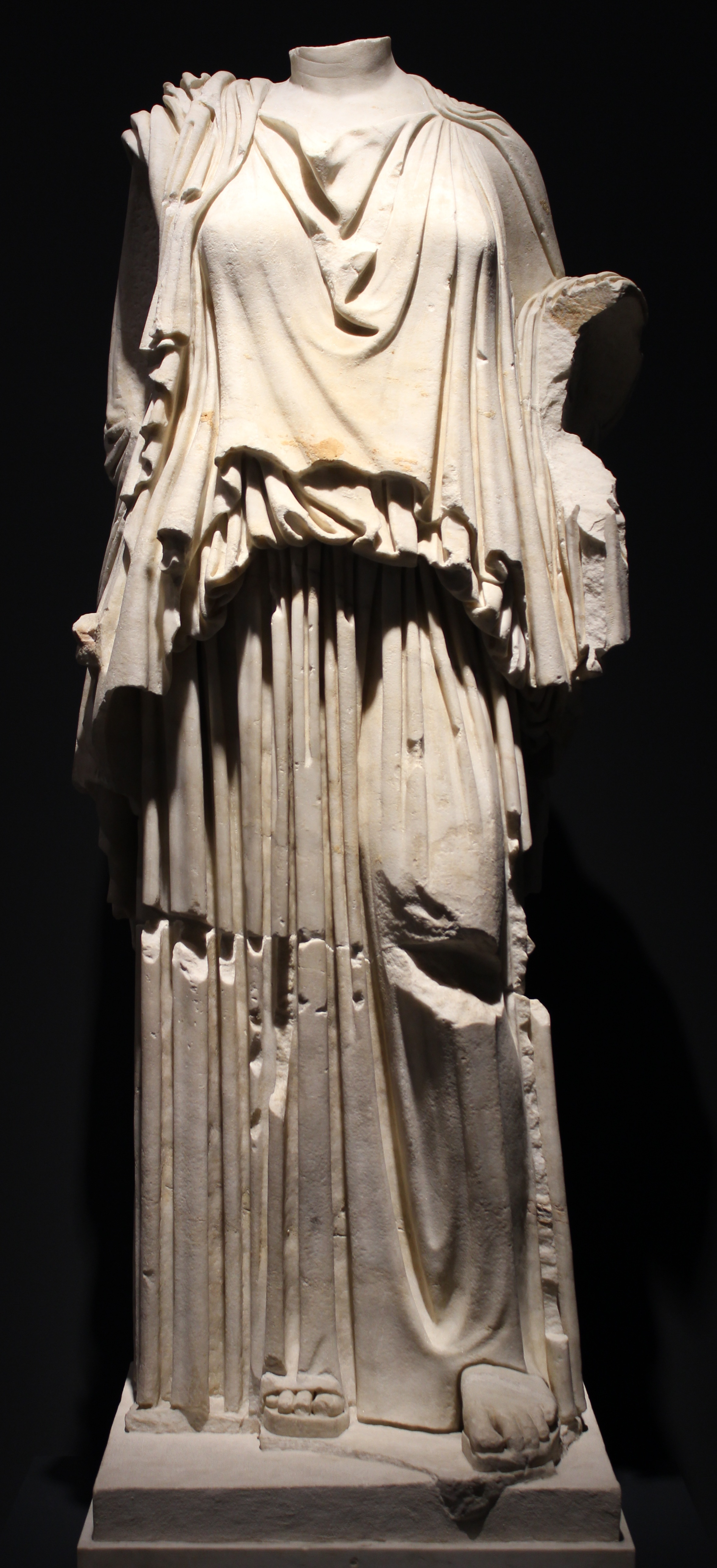 Palazzo Massimo alle Terme. Peplophoros tipo Terme-Palazzo Sacchetti.